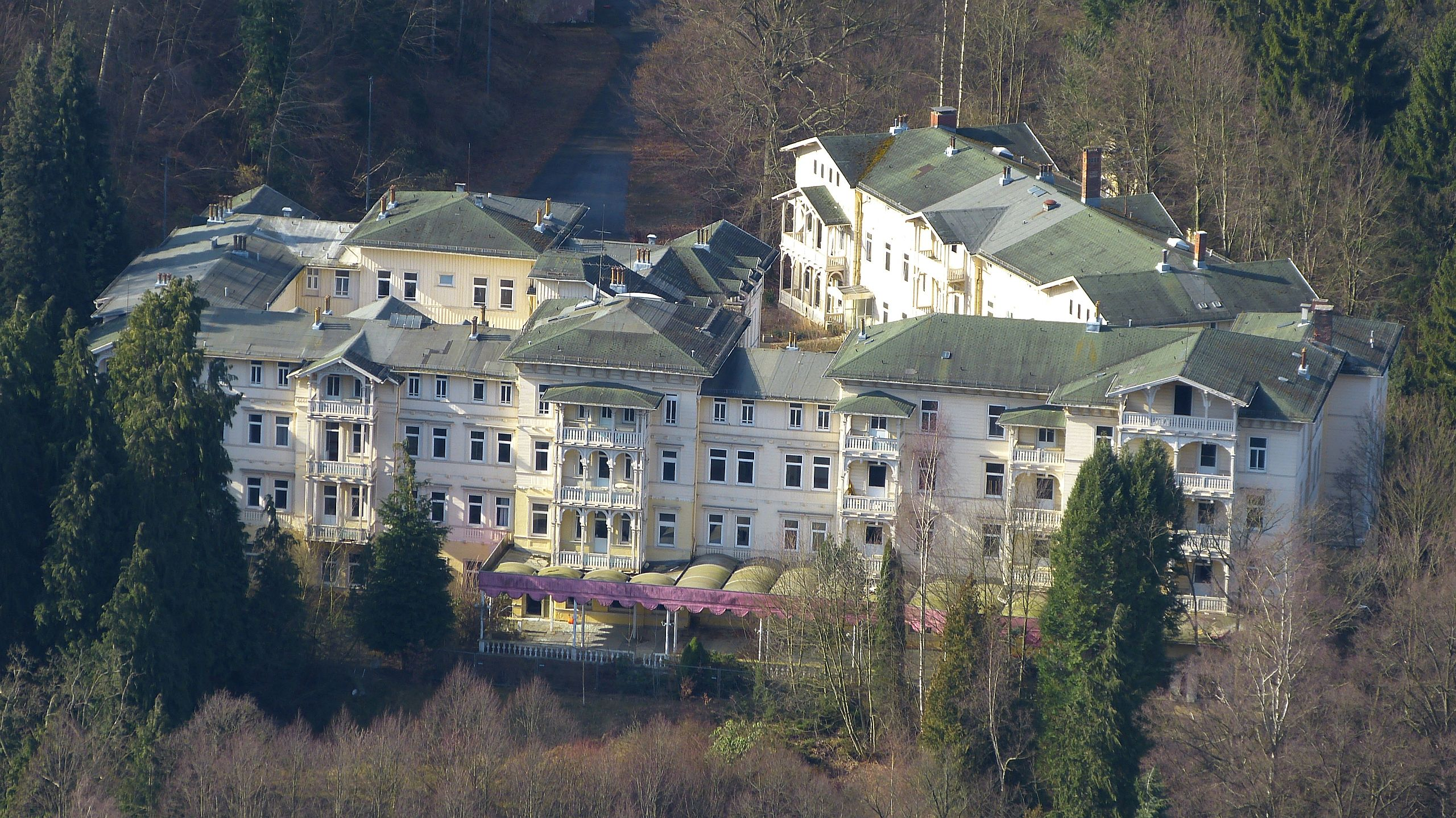 Der Harzburger Hof aufgenommen vom Großen Burgberg knapp drei Monate vor dessen Vernichtung durch Brandstftung